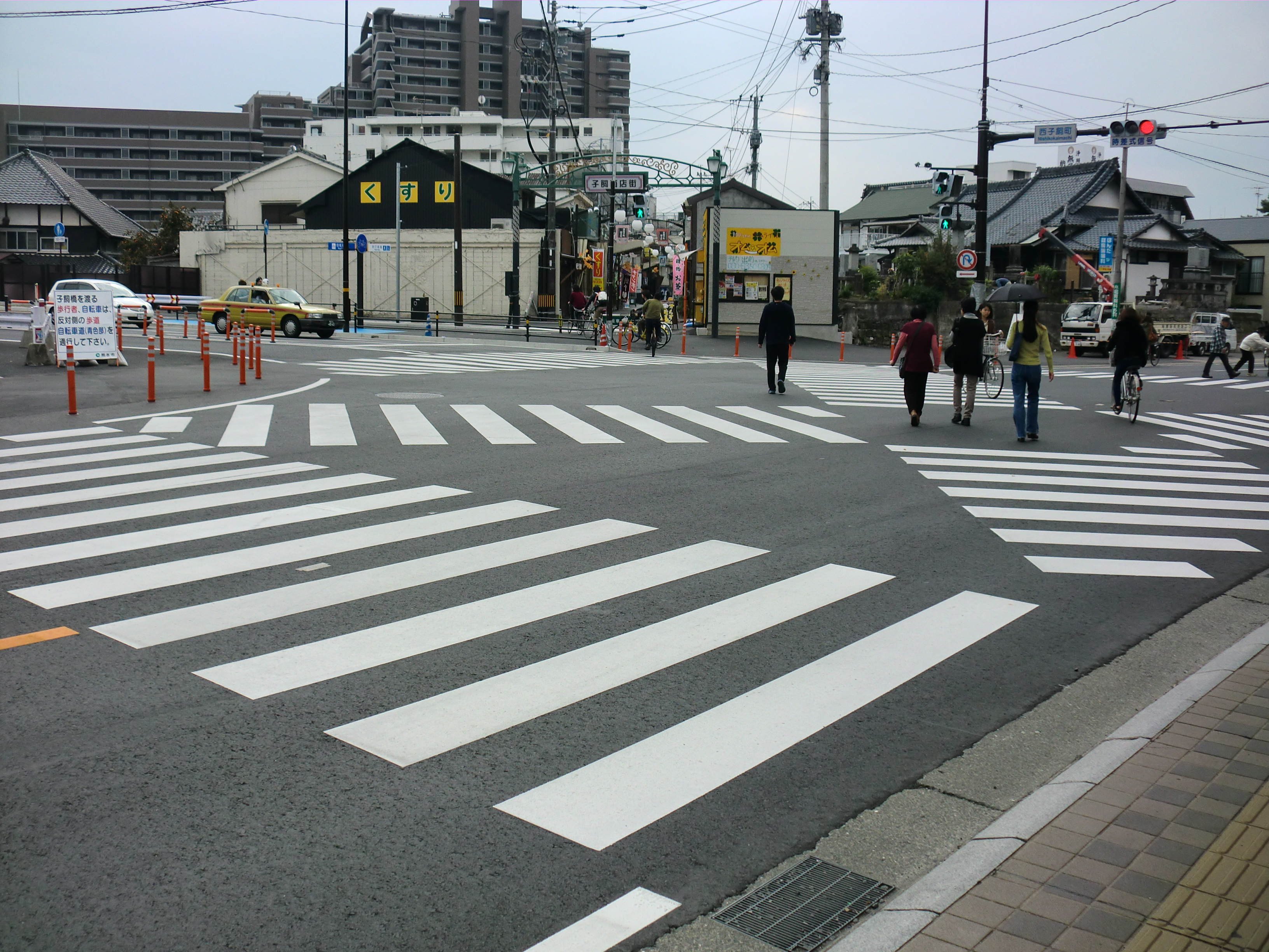 熊本市中央区にある西子飼町（にしこかいまち）交差点（日本初？のスクランブル交差点）